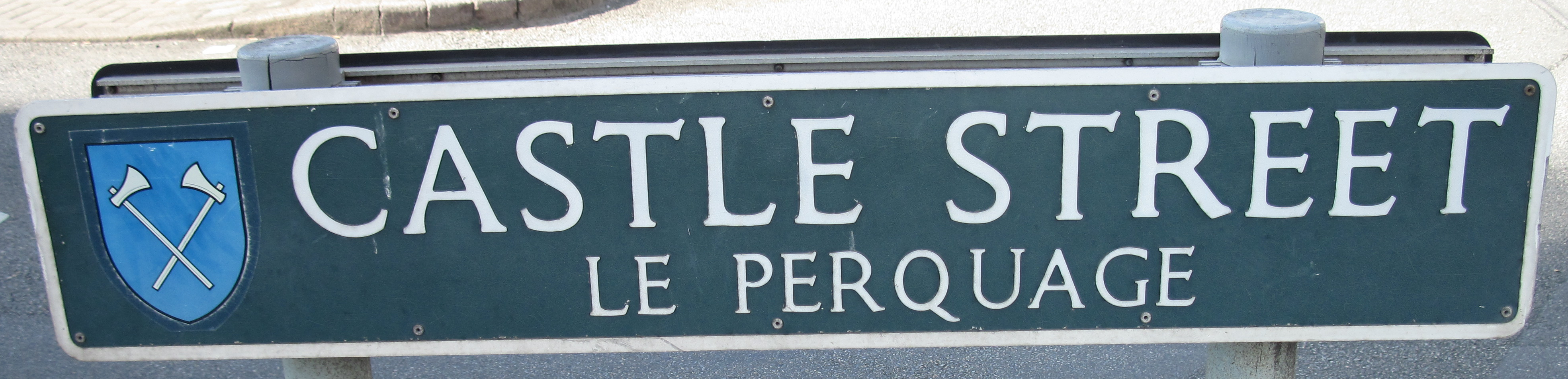 Nrf: Lé Pèrquage, Saint Hélyi, Jèrri